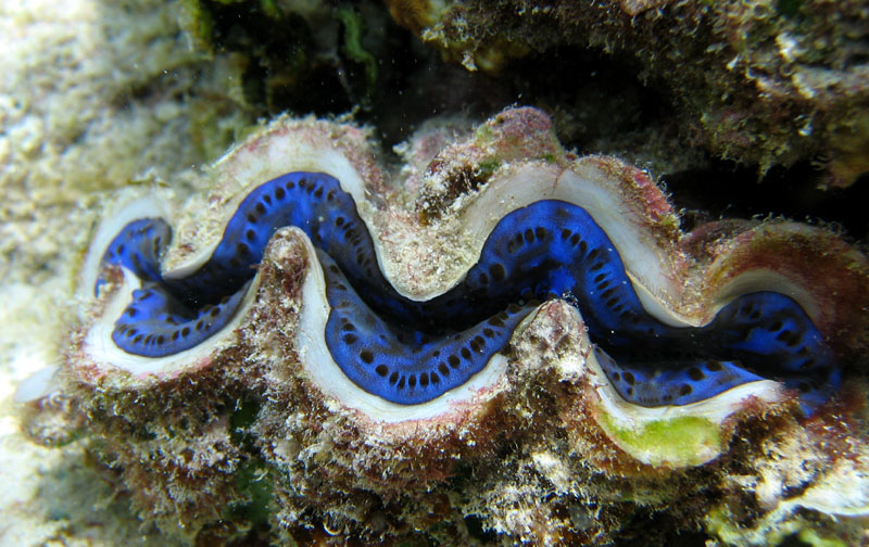 Tridacna sp.